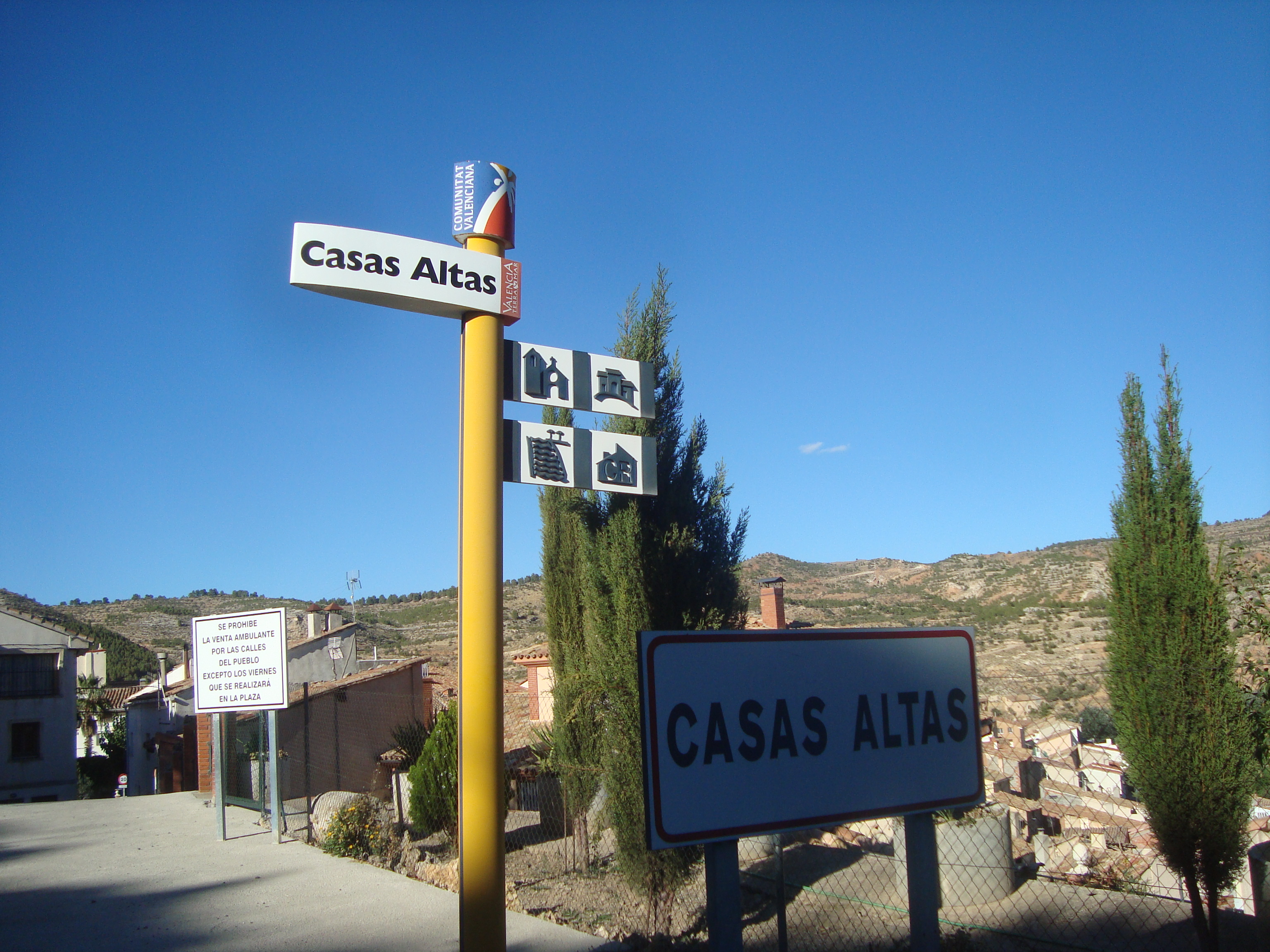 Casas Altas es un municipio de la Comunidad Valenciana, España. Perteneciente a la provincia de Valencia, en la comarca del Rincón de Ademuz.